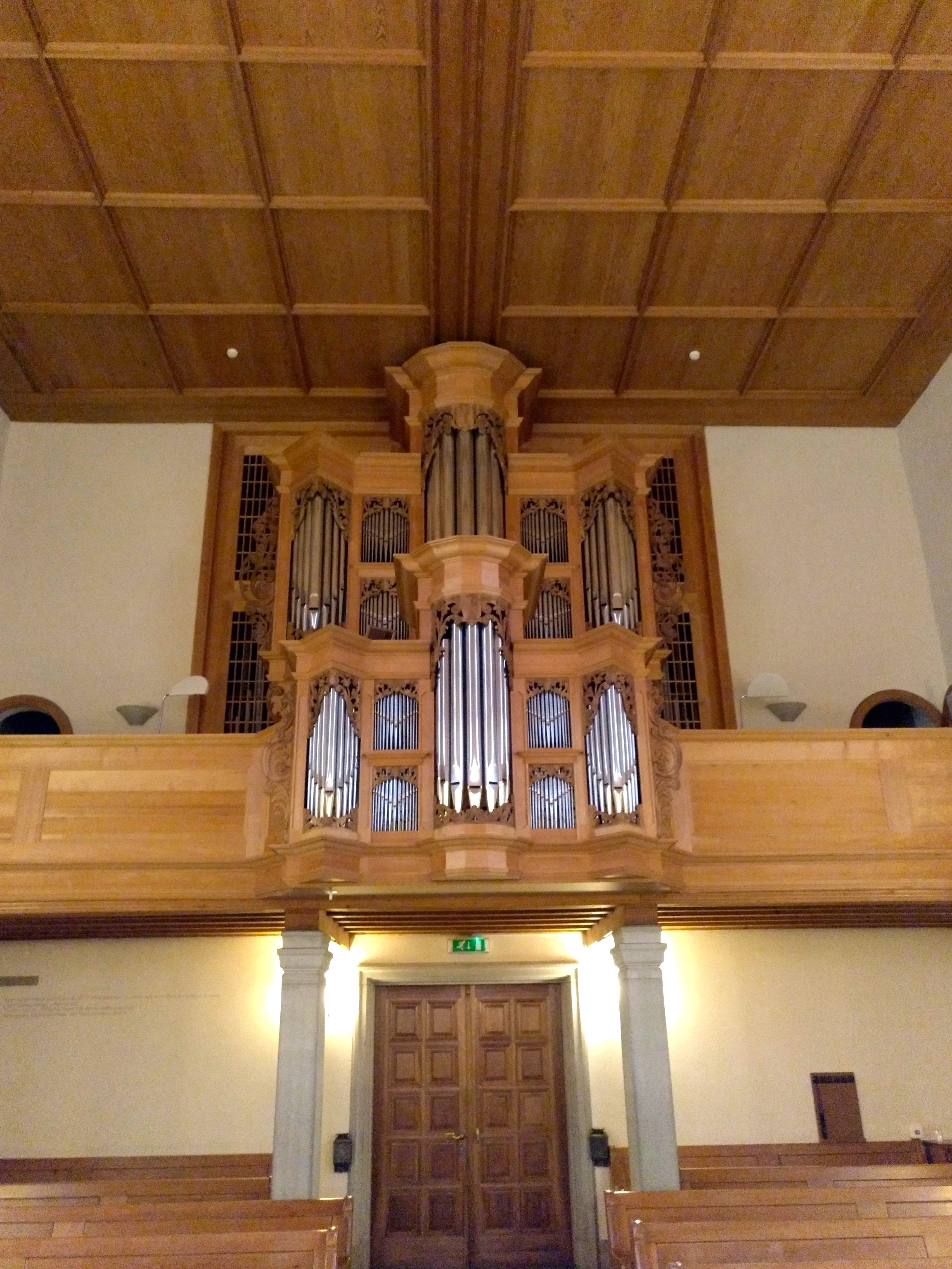 Empore mit Felsberg-Orgel (1988) der Kirche St. Mangen in St. Gallen